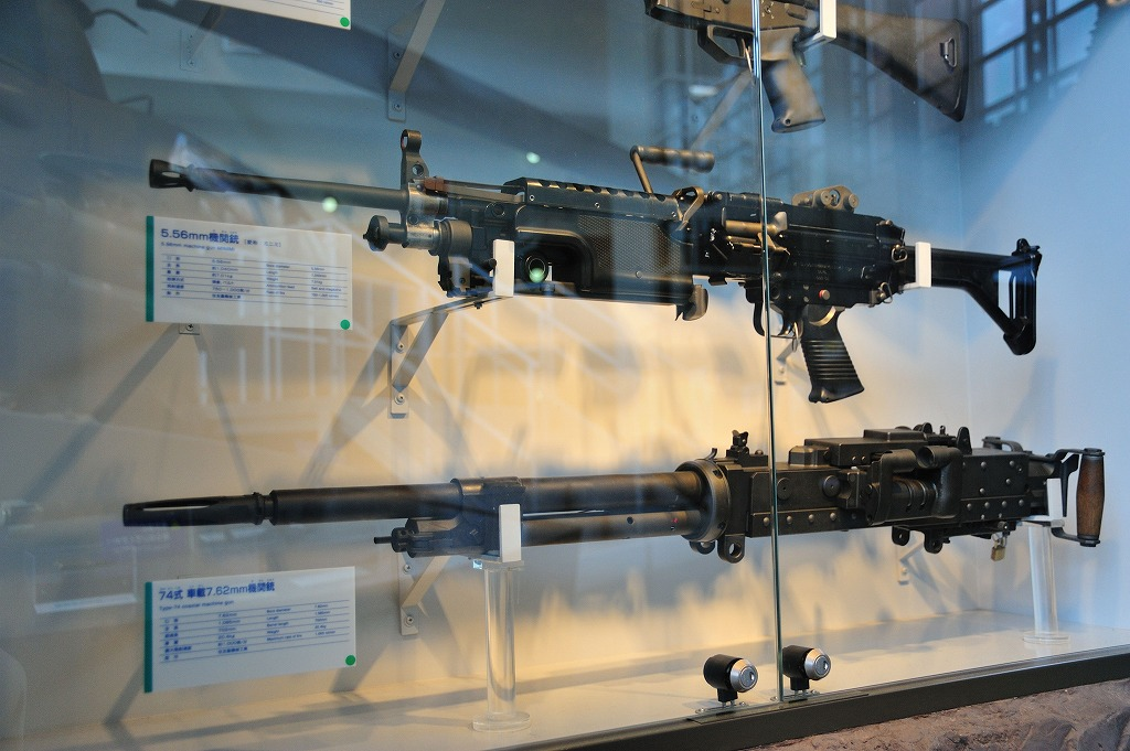 陸上自衛隊広報センターに展示されている74式車載7.62mm機関銃と5.56mm機関銃MINIMI